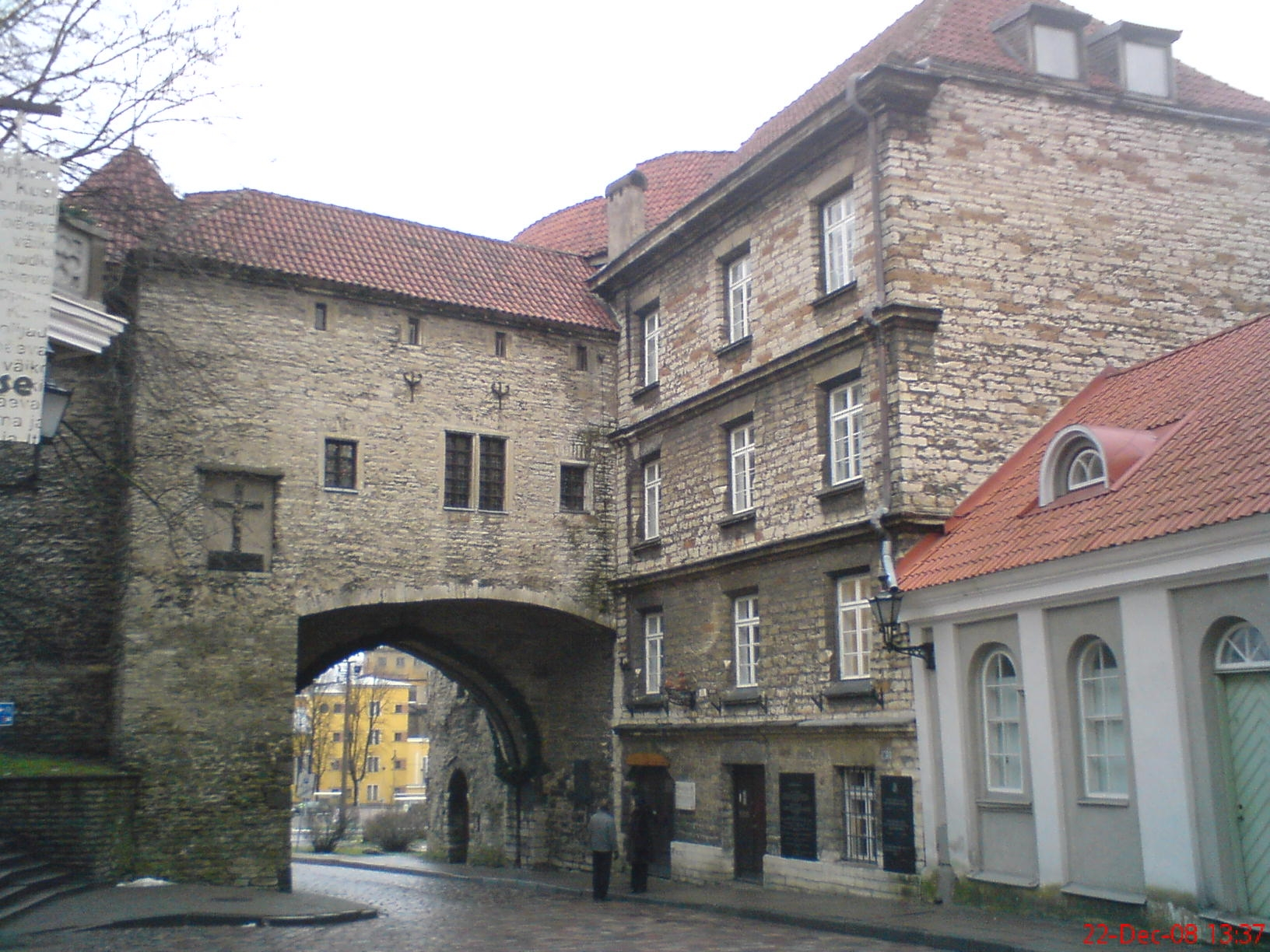 Hoone Tallinna vanalinnas aadressil Pikk tänav 70, vaade Pikalt tänavalt